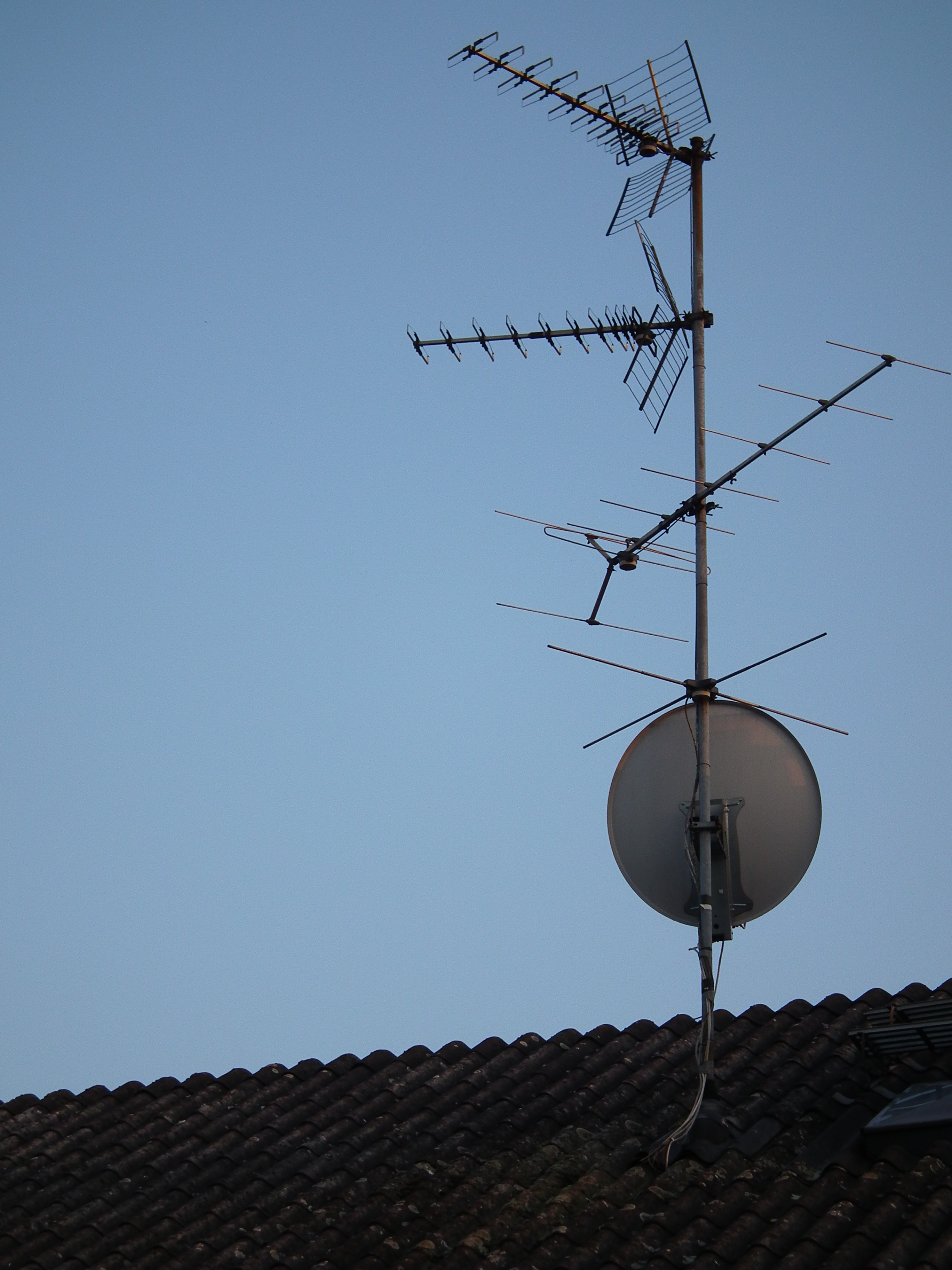 Vier Dachantennen für terrestrischen TV-Empfang ("DVB-T"), UKW-Radioempfang sowie Satellitenschüssel